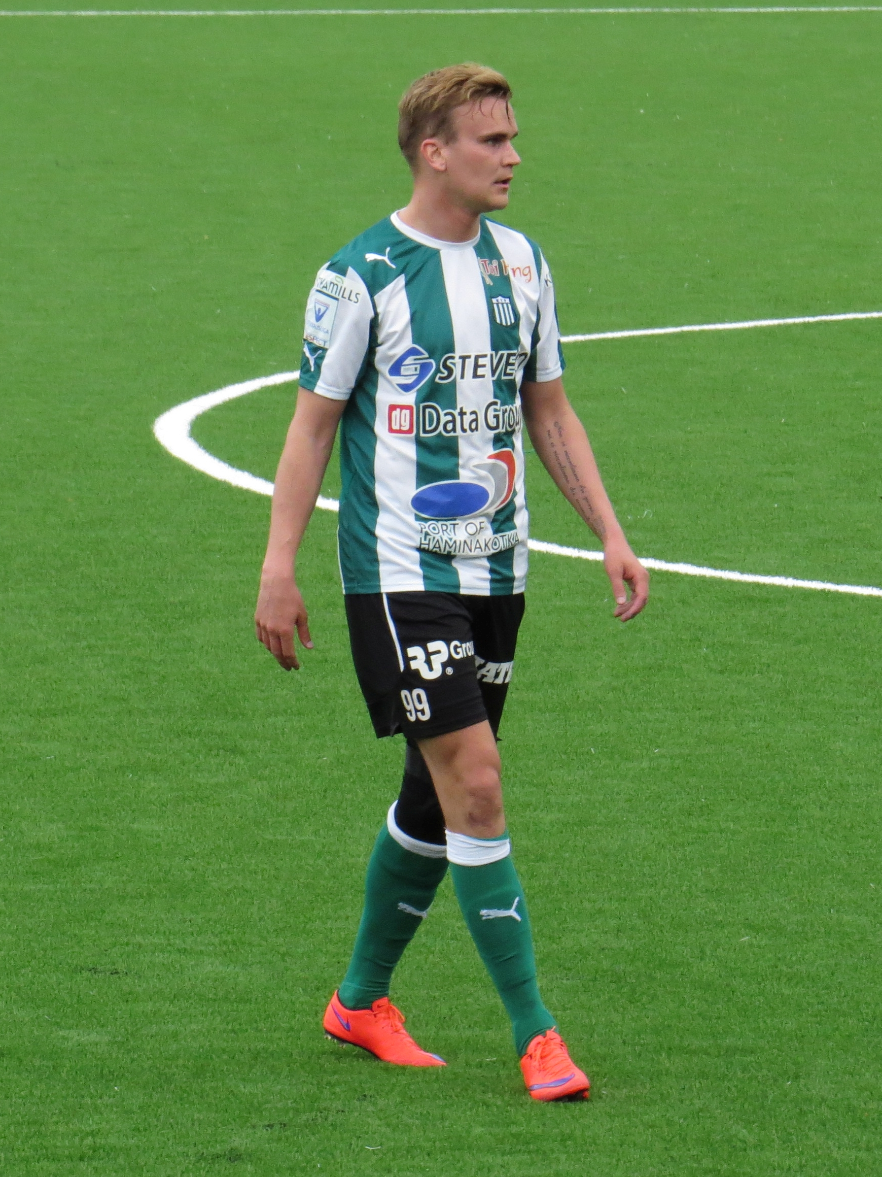 Suomalainen jalkapalloilija Niko Ikävalko FC KTP:n paidassa kaudella 2015.